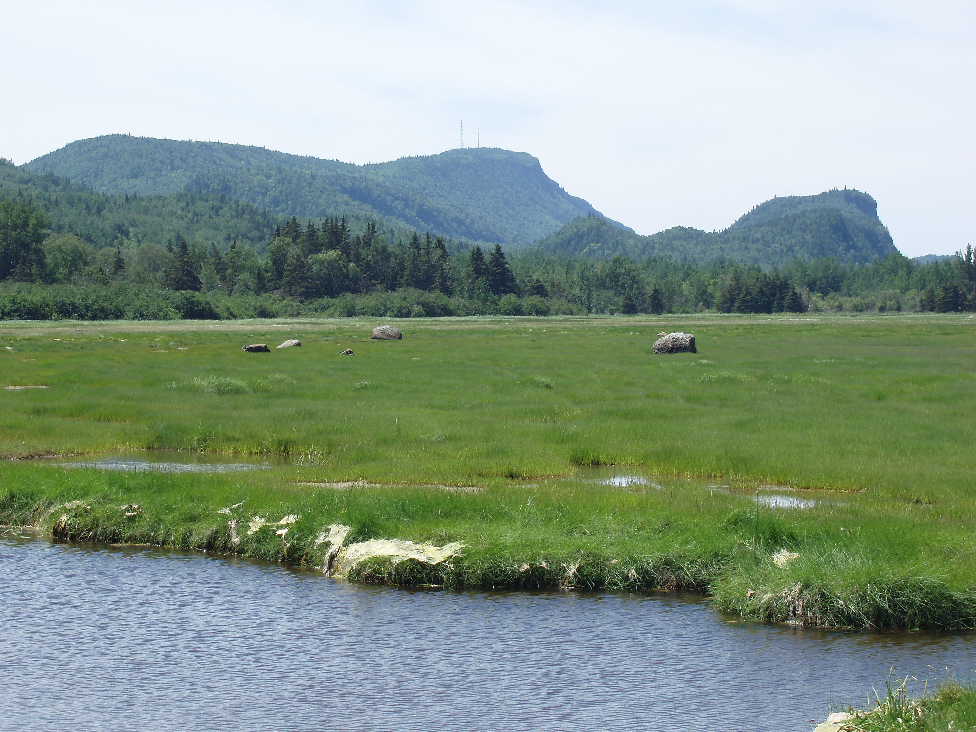 Pic Champlain vu du nord-est à partir du marais de la Pointe aux Epinettes, Parc National du Bic, Québec, Canada